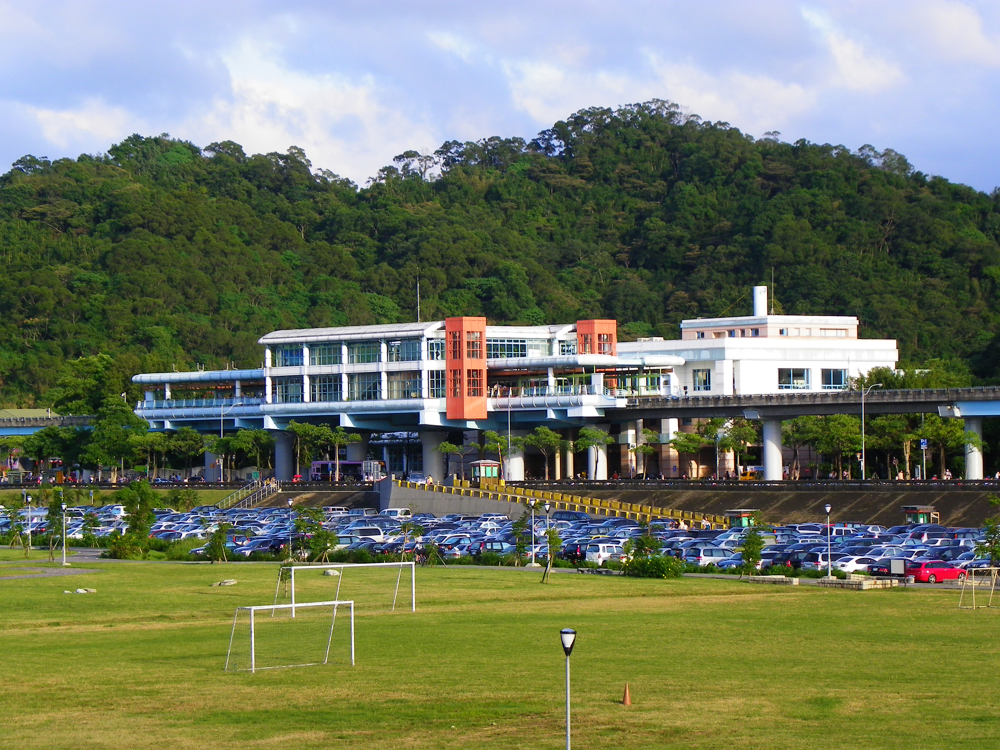 台北捷運文山線動物園駅の遠景。